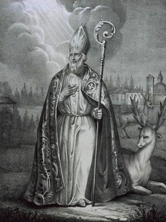 Litografia di San Bassiano, conservato alla Biblioteca Laudense.